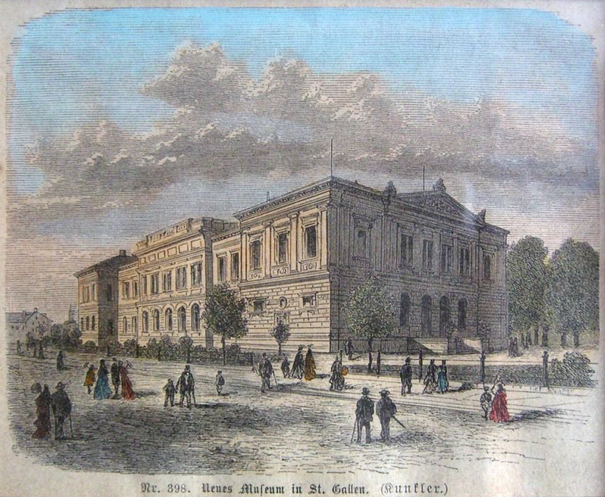 "Neues Museum in St. Gallen. (Kunkler)". Kolorierter Holzstich, ca. 9 x 11 cm.